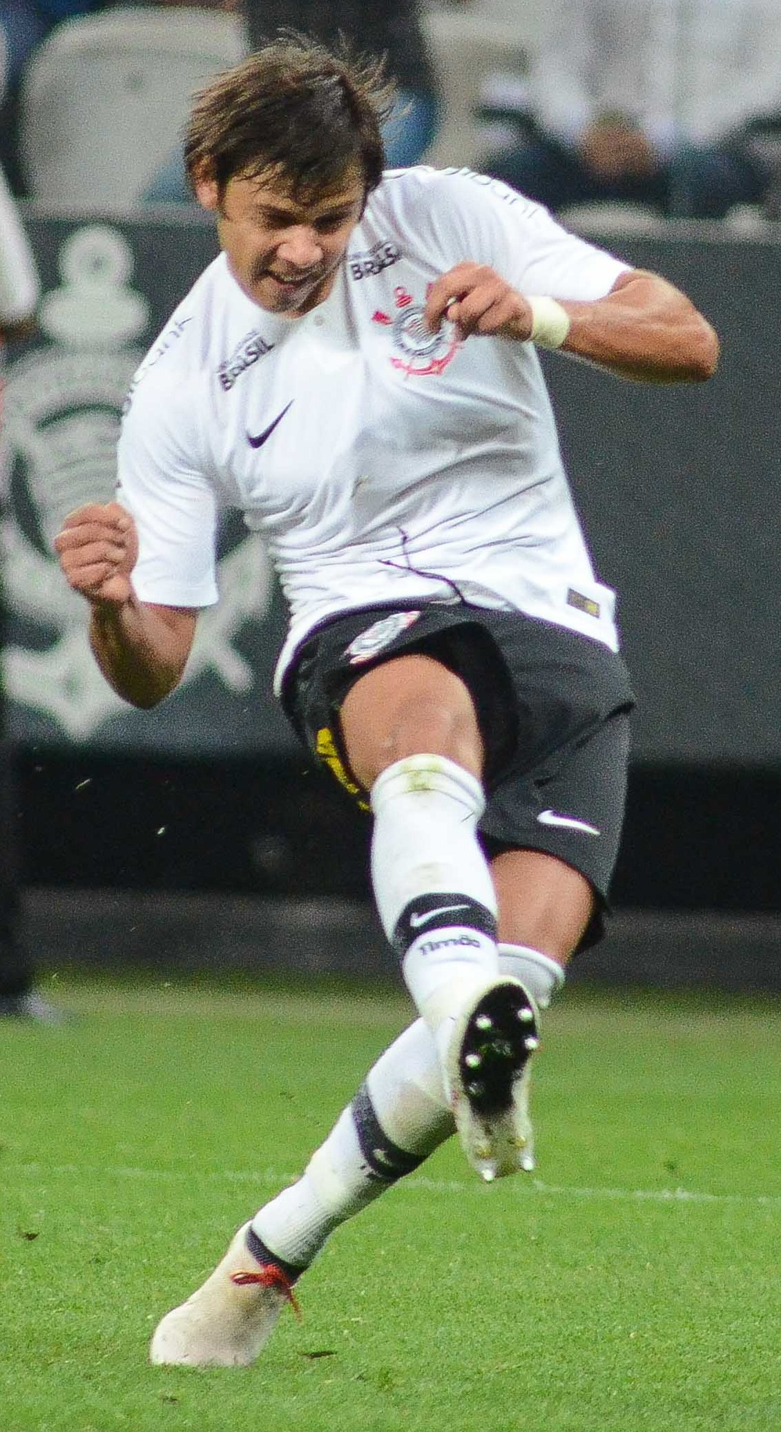 Partida valida pela oitavas de final da copa do brasil 2018